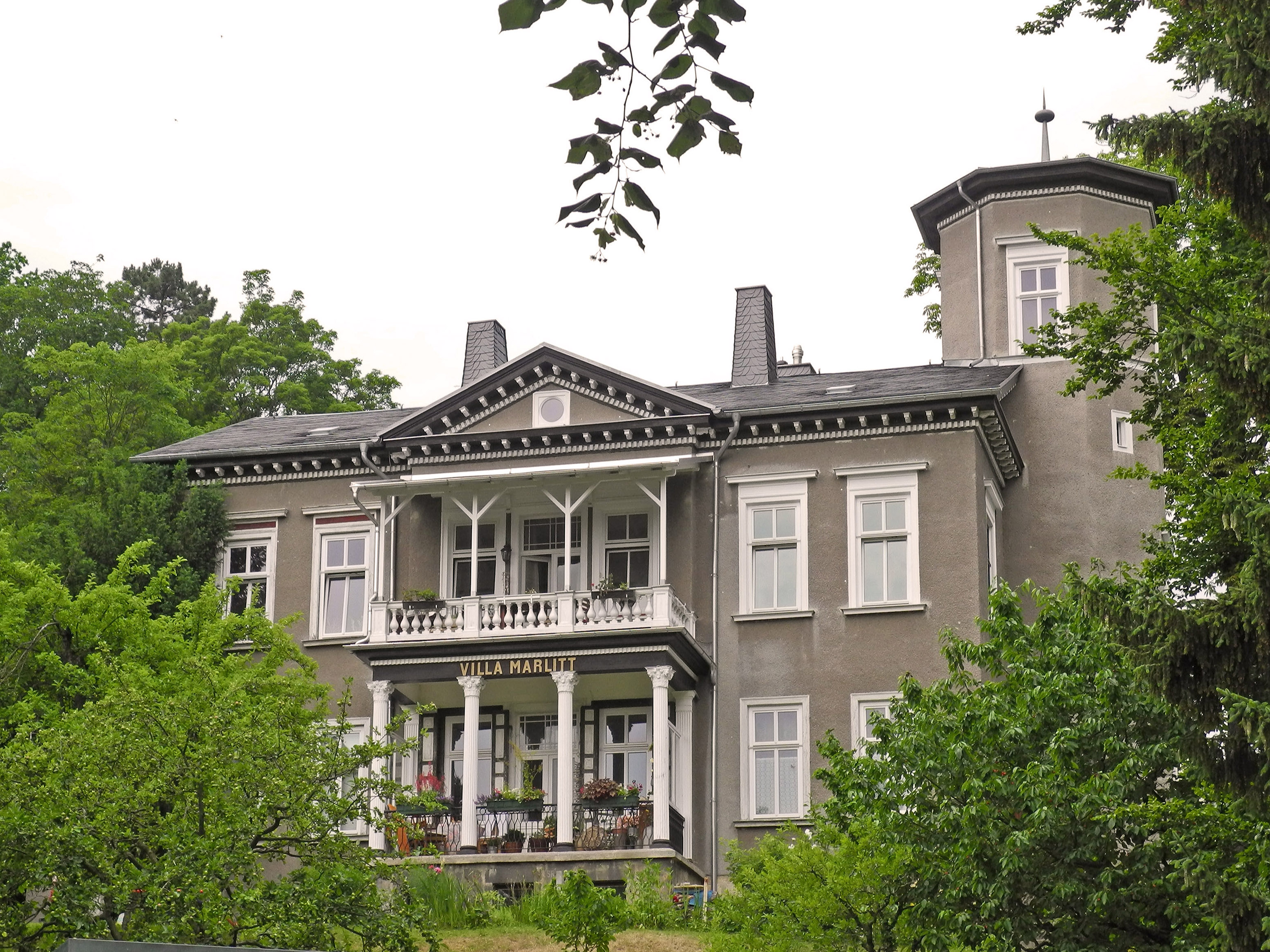 Villa Marlittstraße 9 in Arnstadt, Wohnhaus der Schriftstellerin E. Marlitt (1825–1887)